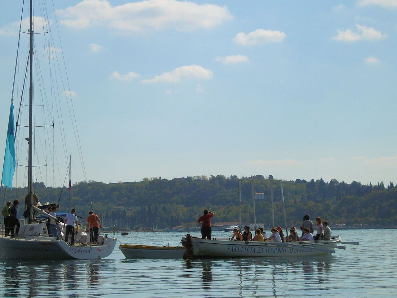 Sailing